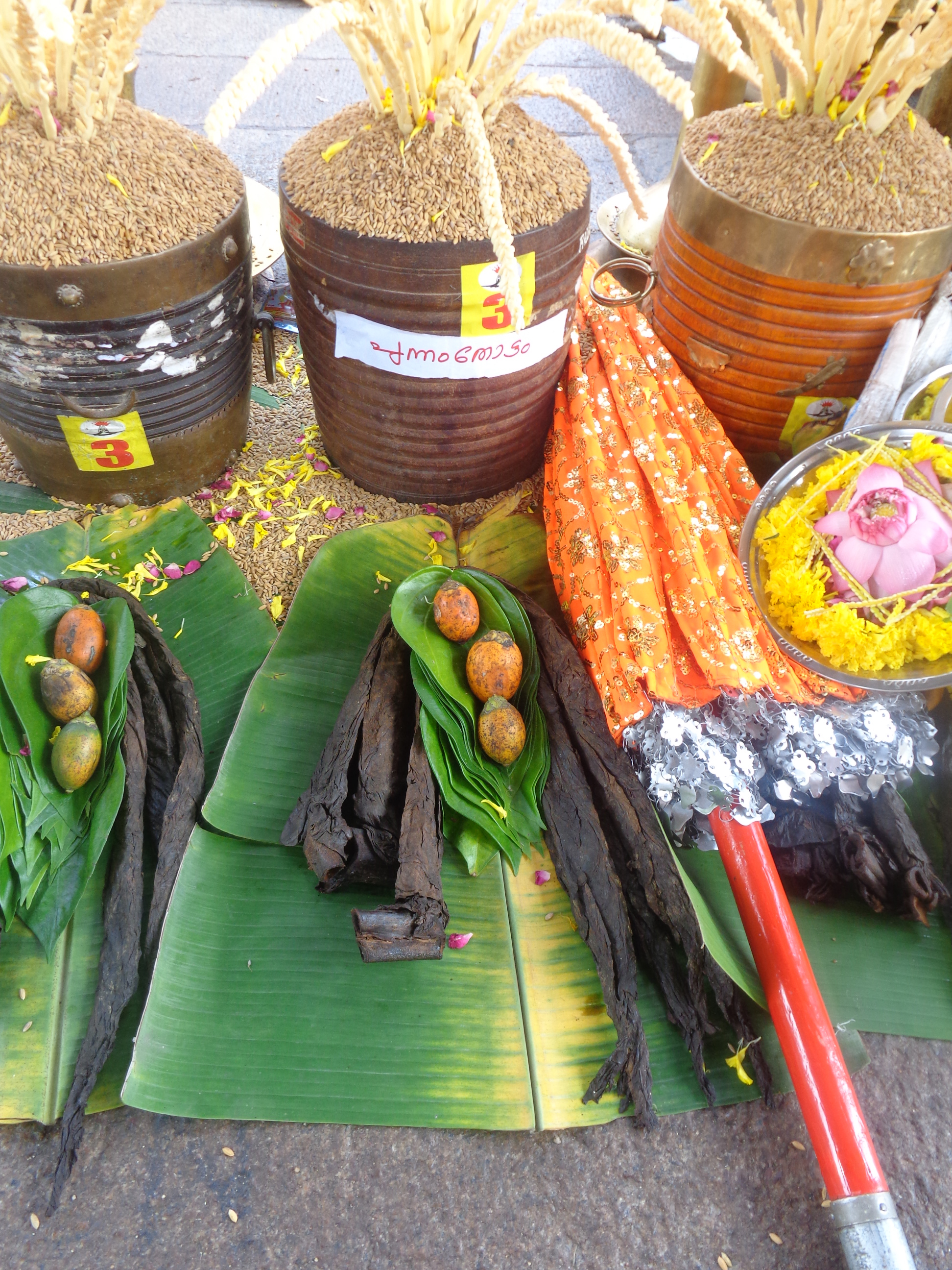 the nirapara put in front of parthasarathi